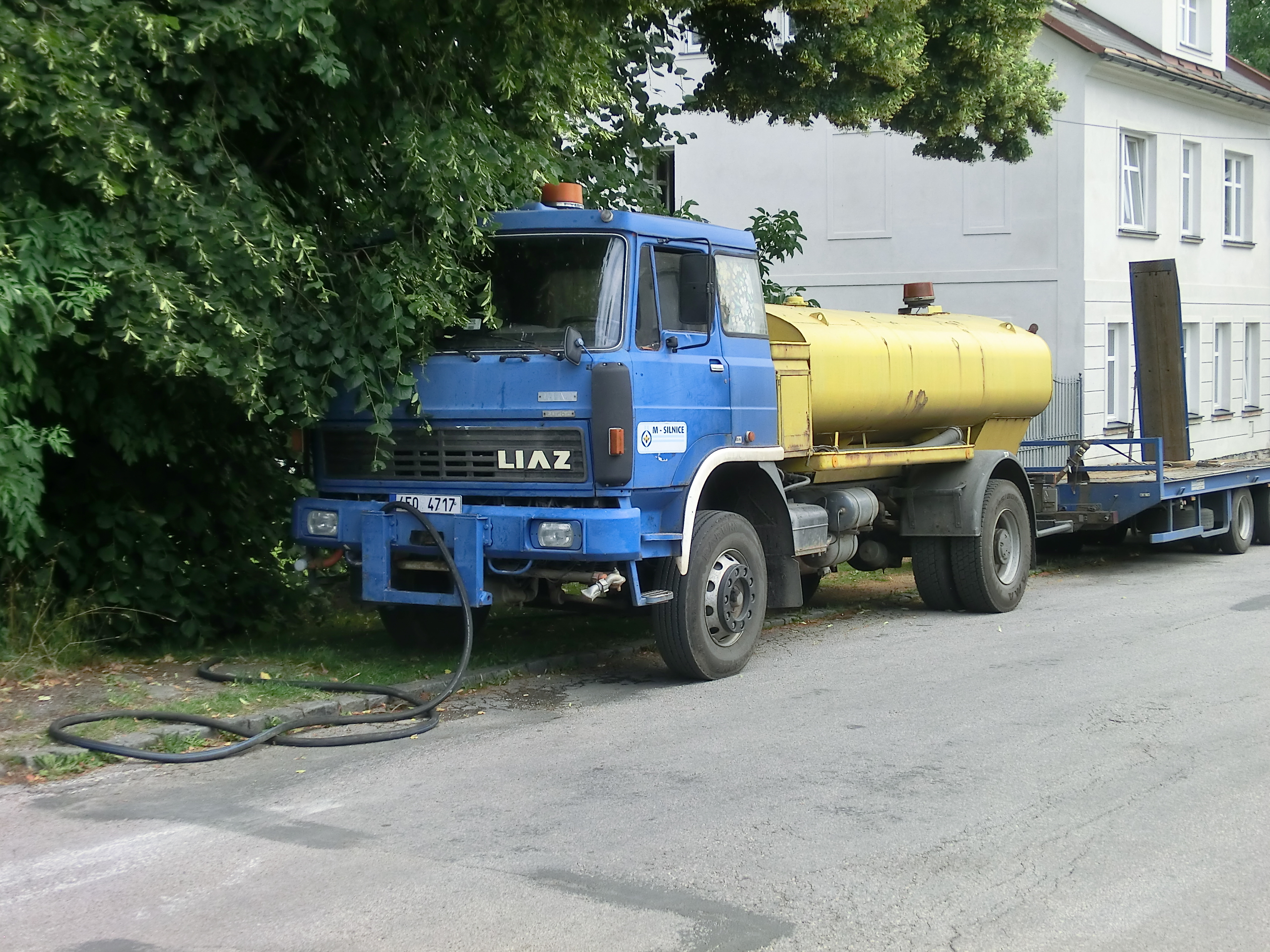 Pravděpodobně LIAZ 110.850 s kropicí nástavbou Karosa SA-8 - jednotlivé typové řady se od sebe navenek špatně rozlišují, obzvlášť po několika letech provozu a zásazích lidové kombinační tvořivosti.